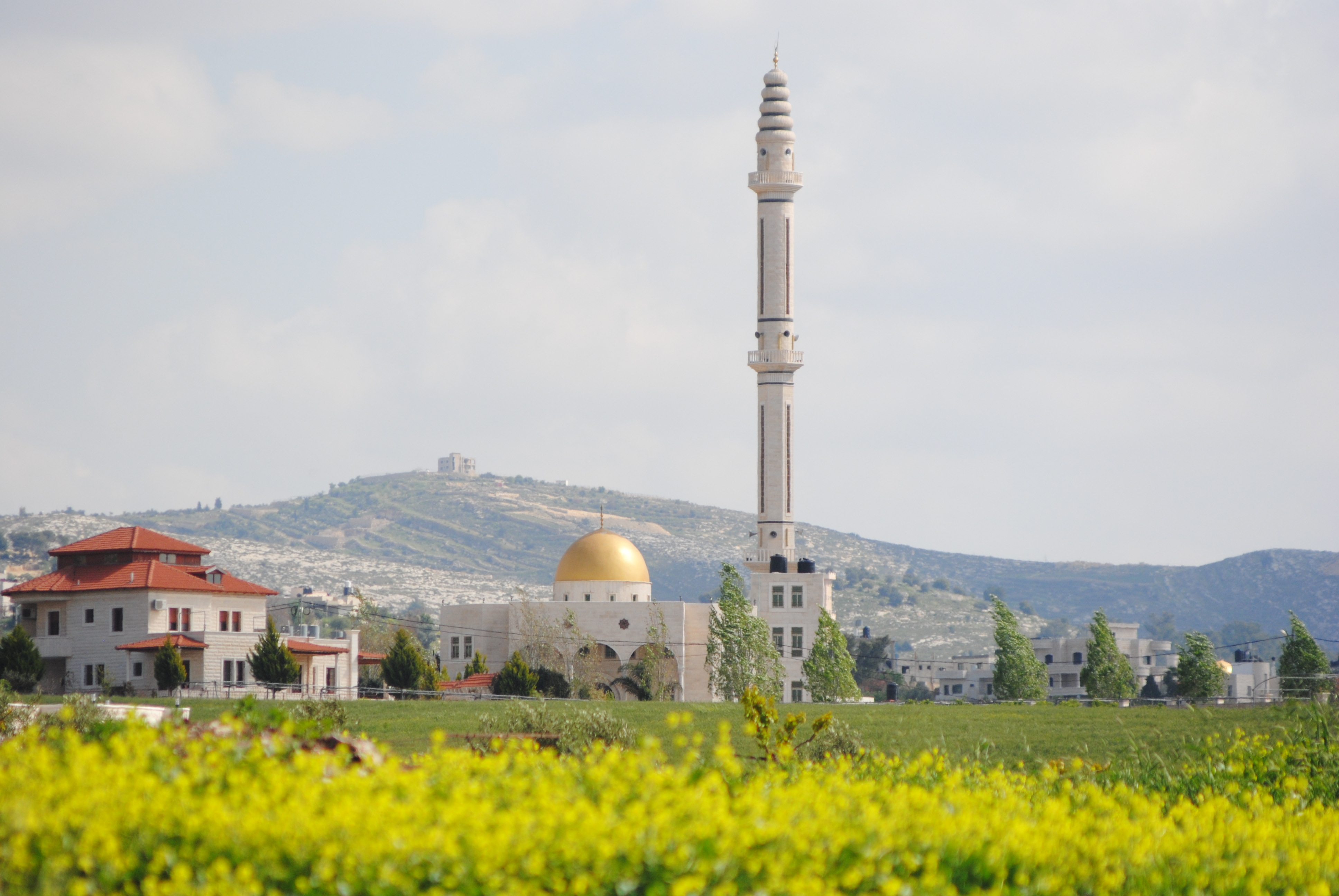 إسلام حلاحله 2015